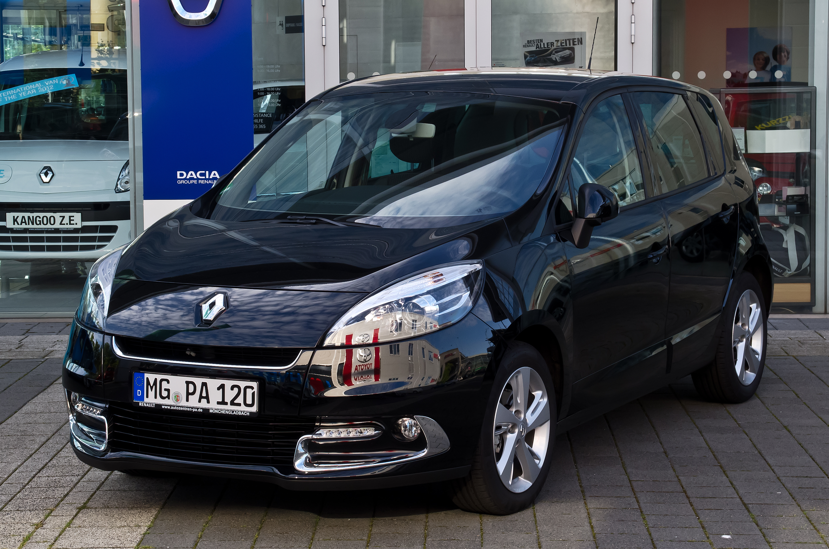 Renault Scénic Dynamique ENERGY dCi 130 Start & Stop (III, Facelift)